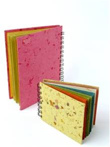 Proyecto ICARO